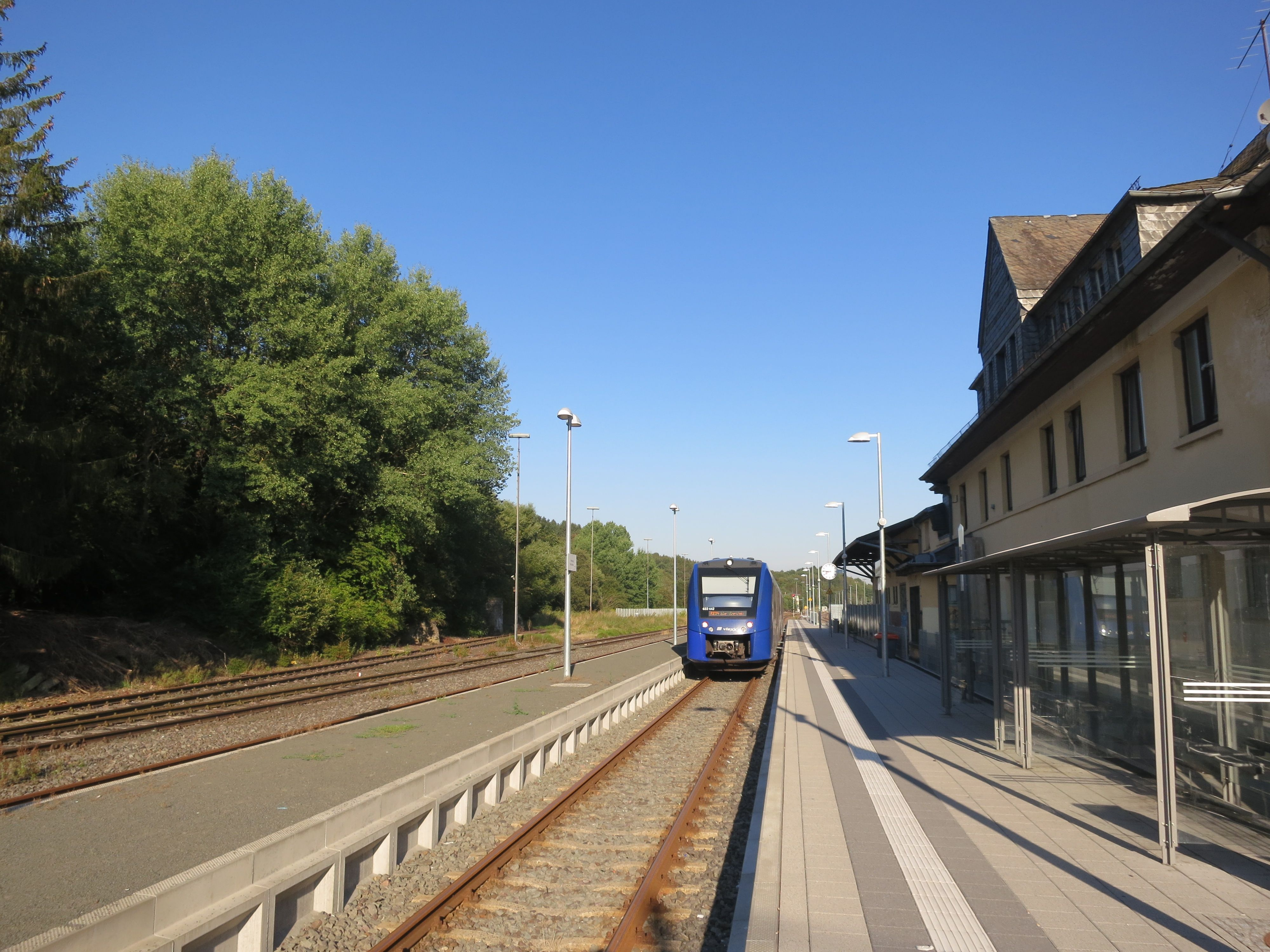 Bahnhof Baumholder, Gleisseite